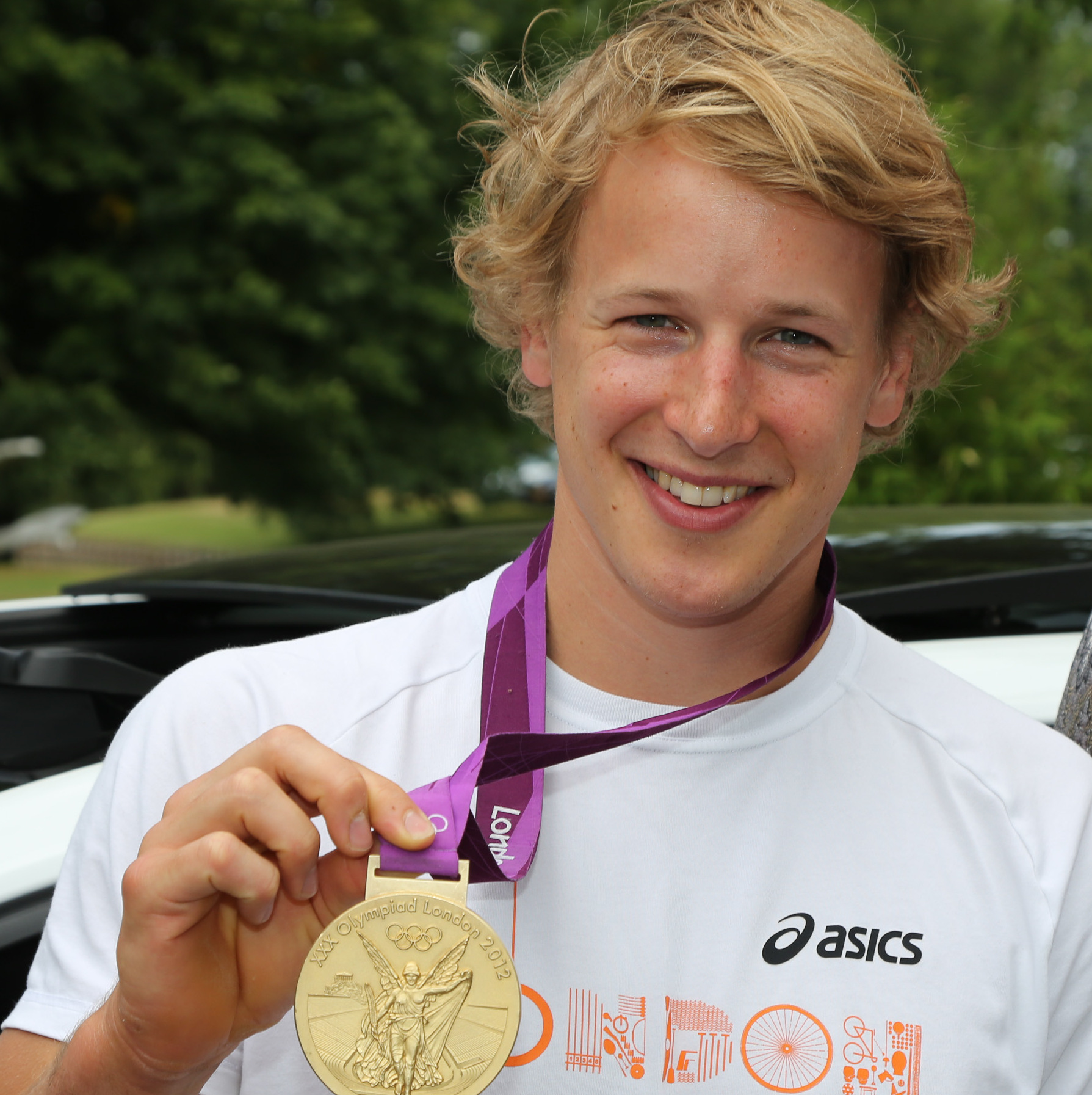 Epke Zonderland met Olympisch goud (Londen 2012)